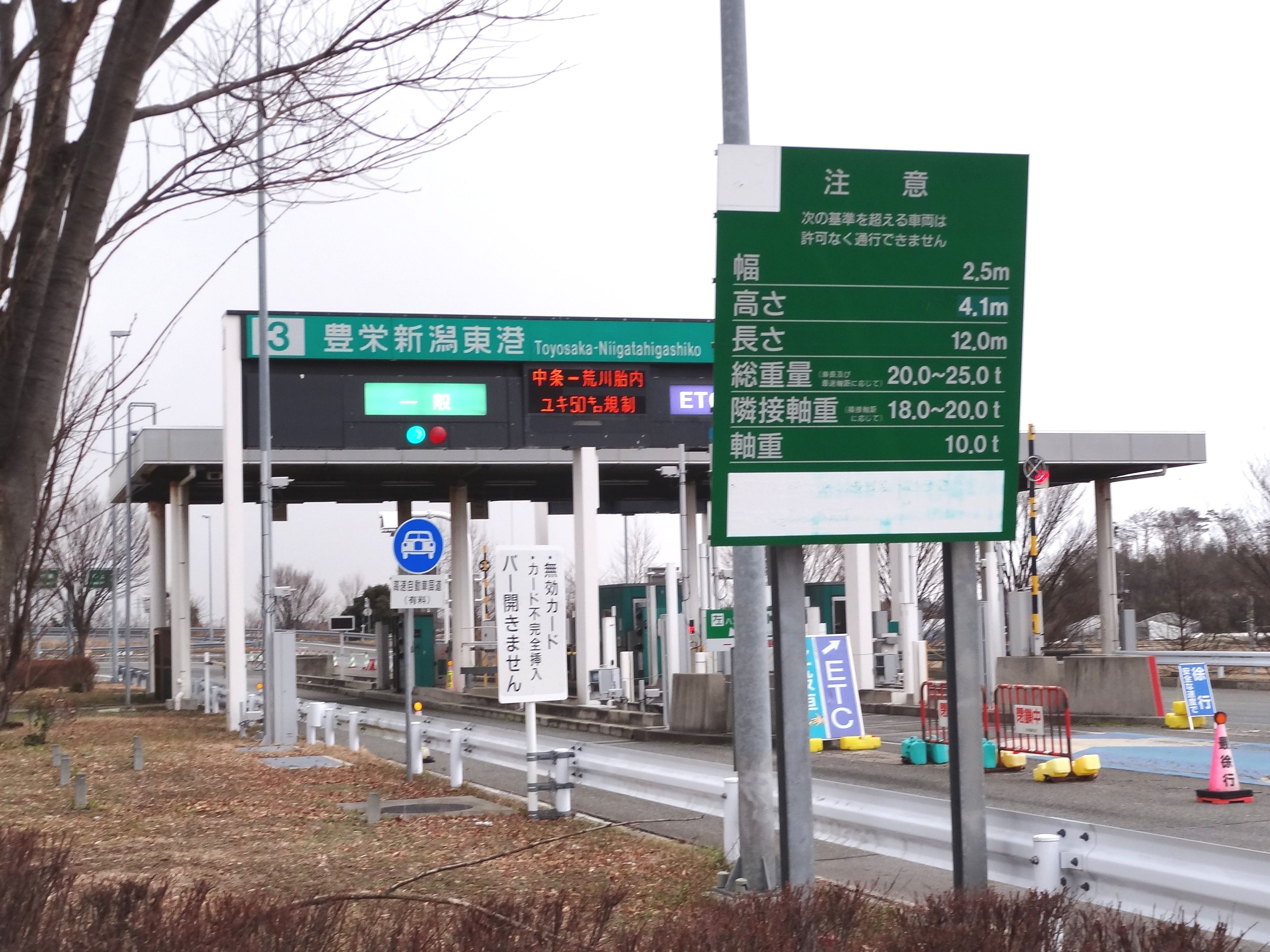 日本海東北自動車道 豊栄新潟東港IC